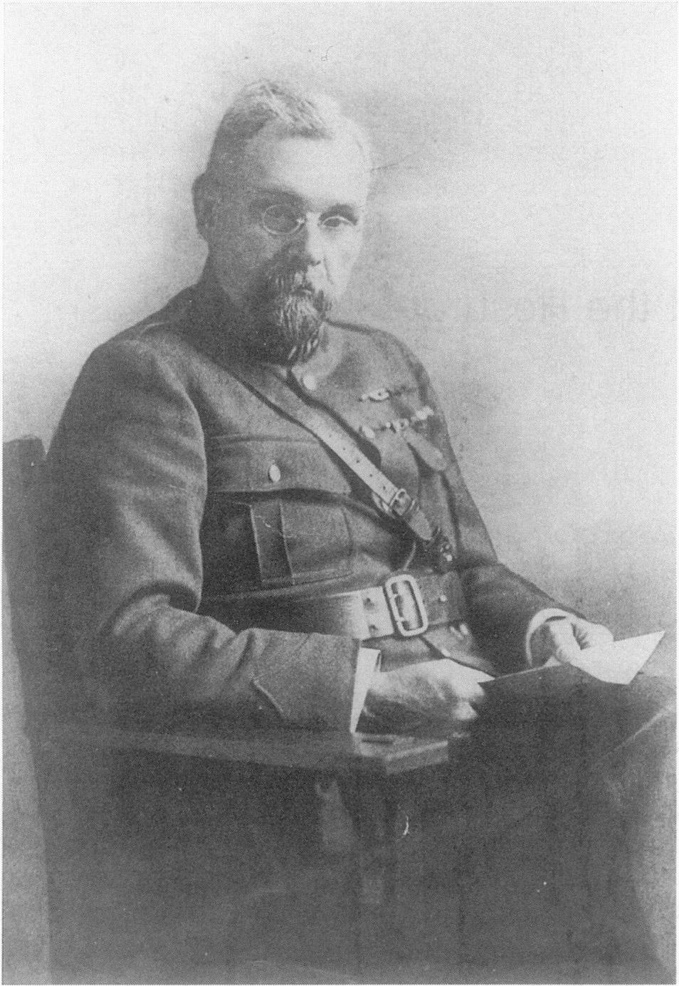 Le docteur Antoine Depage pendant la Première Guerre mondiale